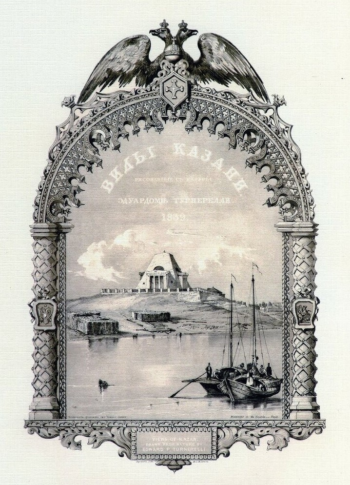 Титульный лист альбома: Виды Казани, рисованные с натуры Эдвардом Турнерелли. - Лондон, 1839.